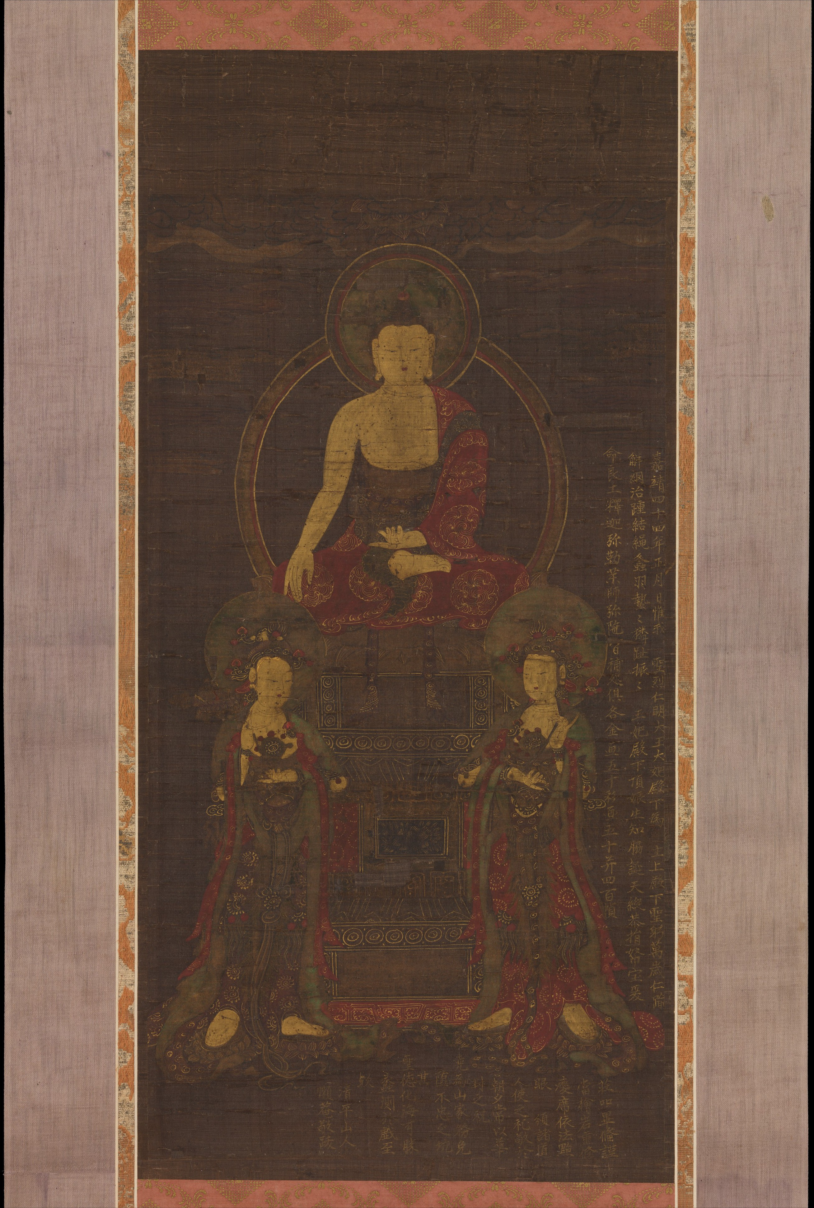 Korea; Hanging scroll; Paintings